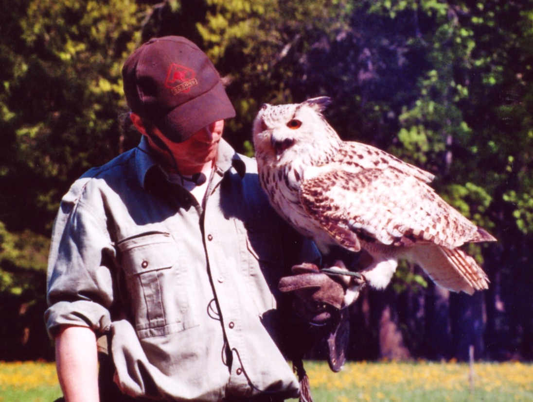 Sibirischer Uhu (Bubo bubo sibiricus) im Wildpark Poing